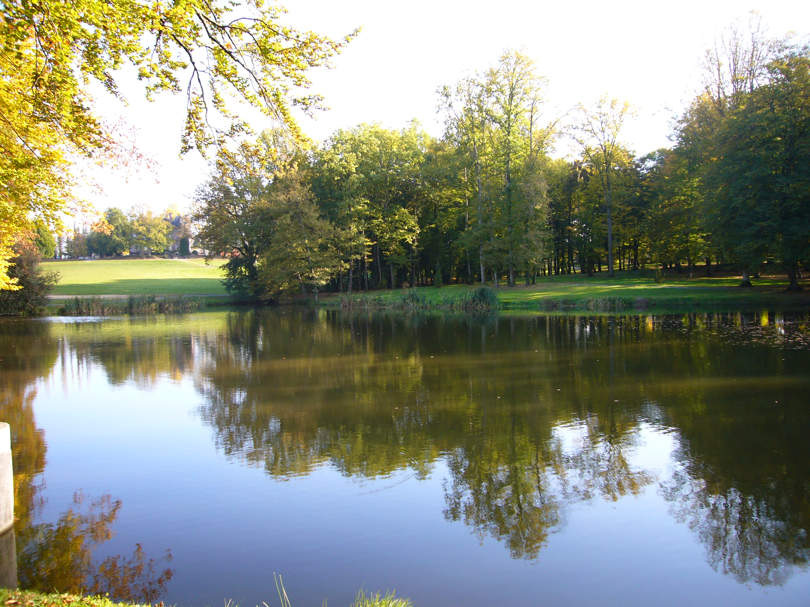 Parc de la Beuasserie, Panazol (87, France)